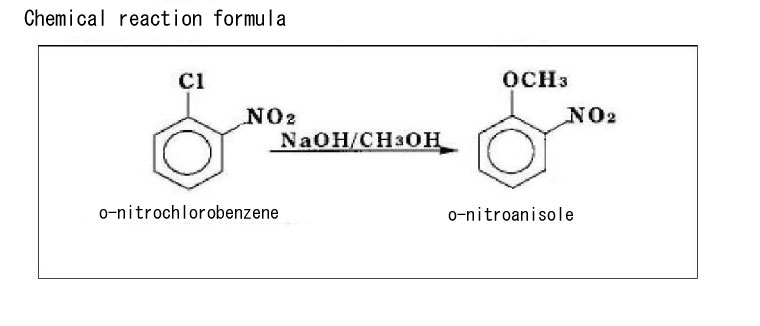 Reakcija nukleofilne supstitucije nitro-supstituisanog aril halogenida